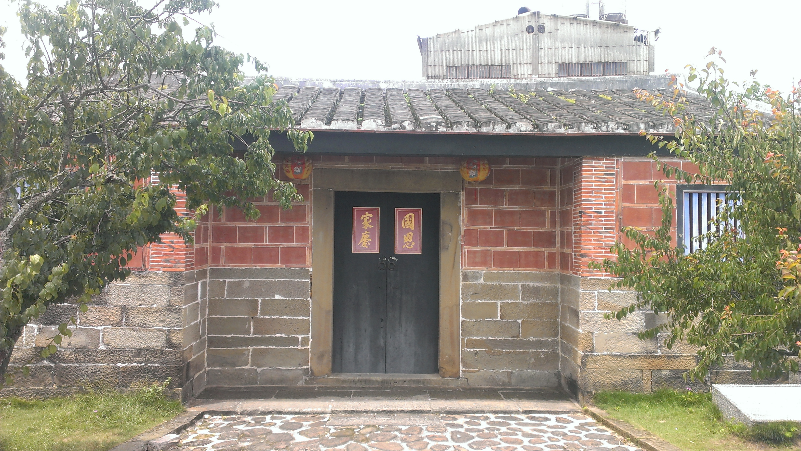 中文（台灣）: 臺灣新竹縣北埔鄉金廣福公館。